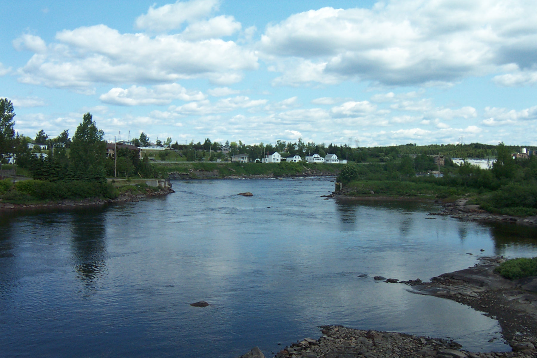 Photo pris des ponts sur Portage des mousses à Port-cartier, orienté vers le nord. On voit ici la rivière aux rochers avec sa chute, le piège aux saumons avec une partie de l'île Patterson nord à droite, et une partie de Port-cartier ouest a gauche.